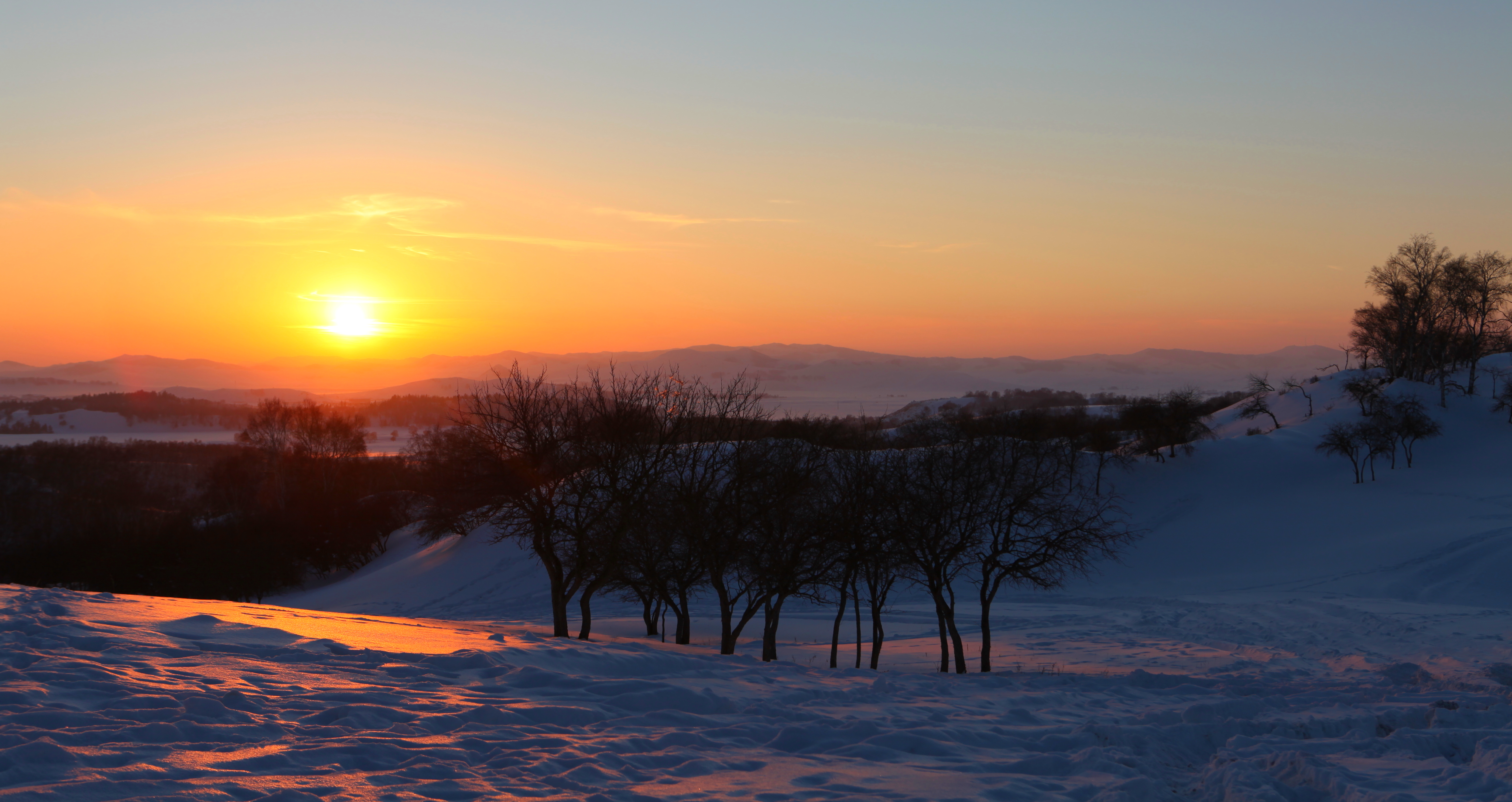 坝上雪原夕阳（路人）